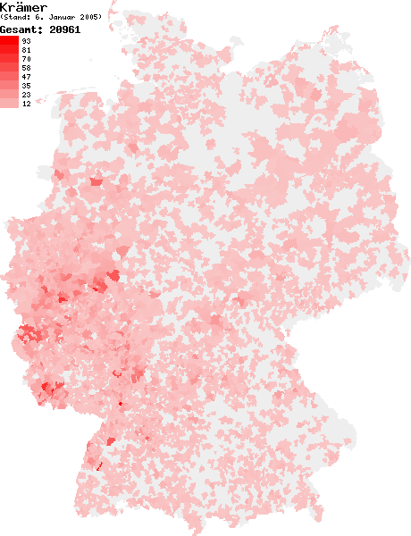 Verteilung des Nachnamens Krämer in Deutschland nach dem Telefonbuch mit Stand vom 6. Januar 2005